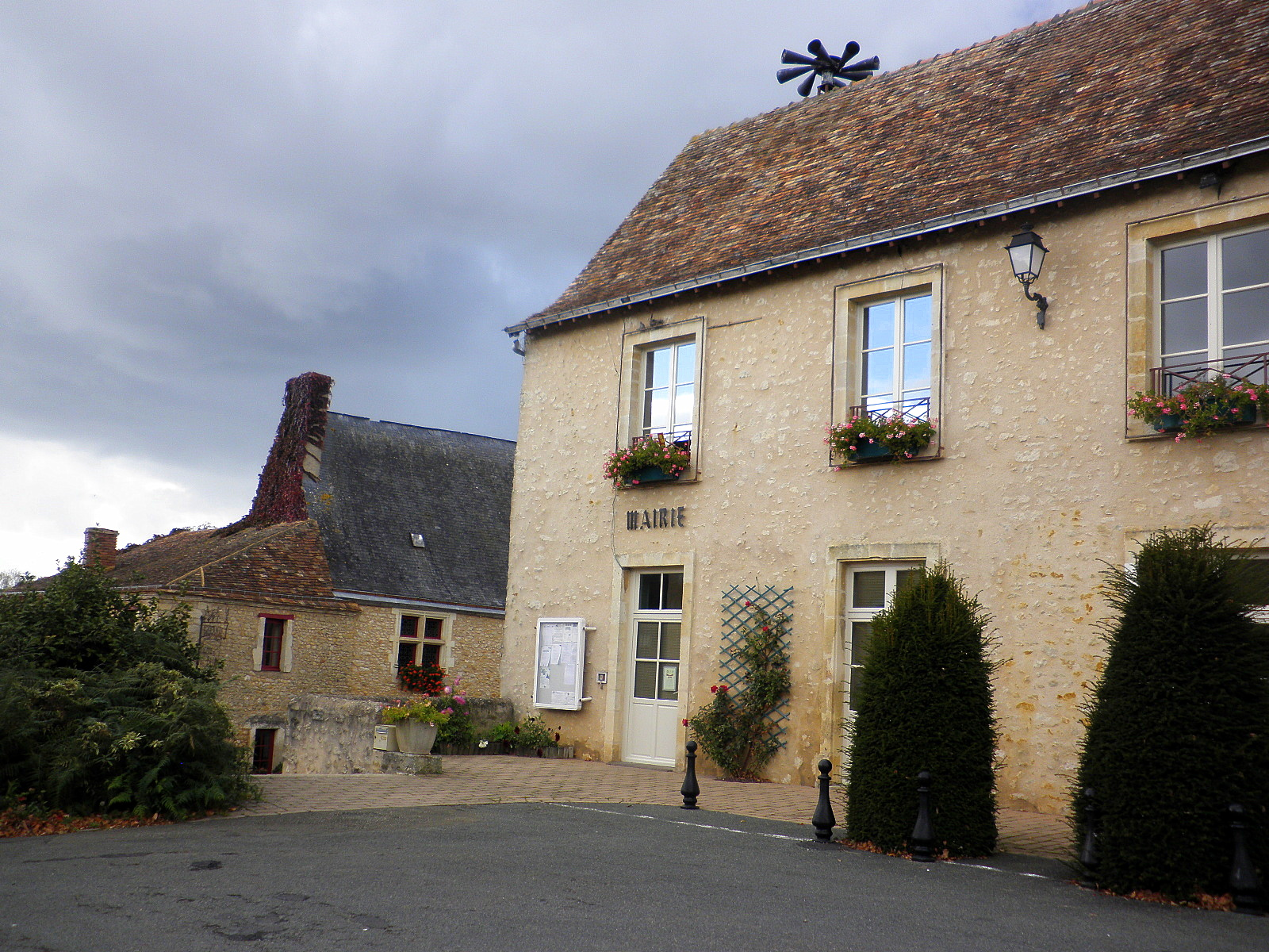 Mairie